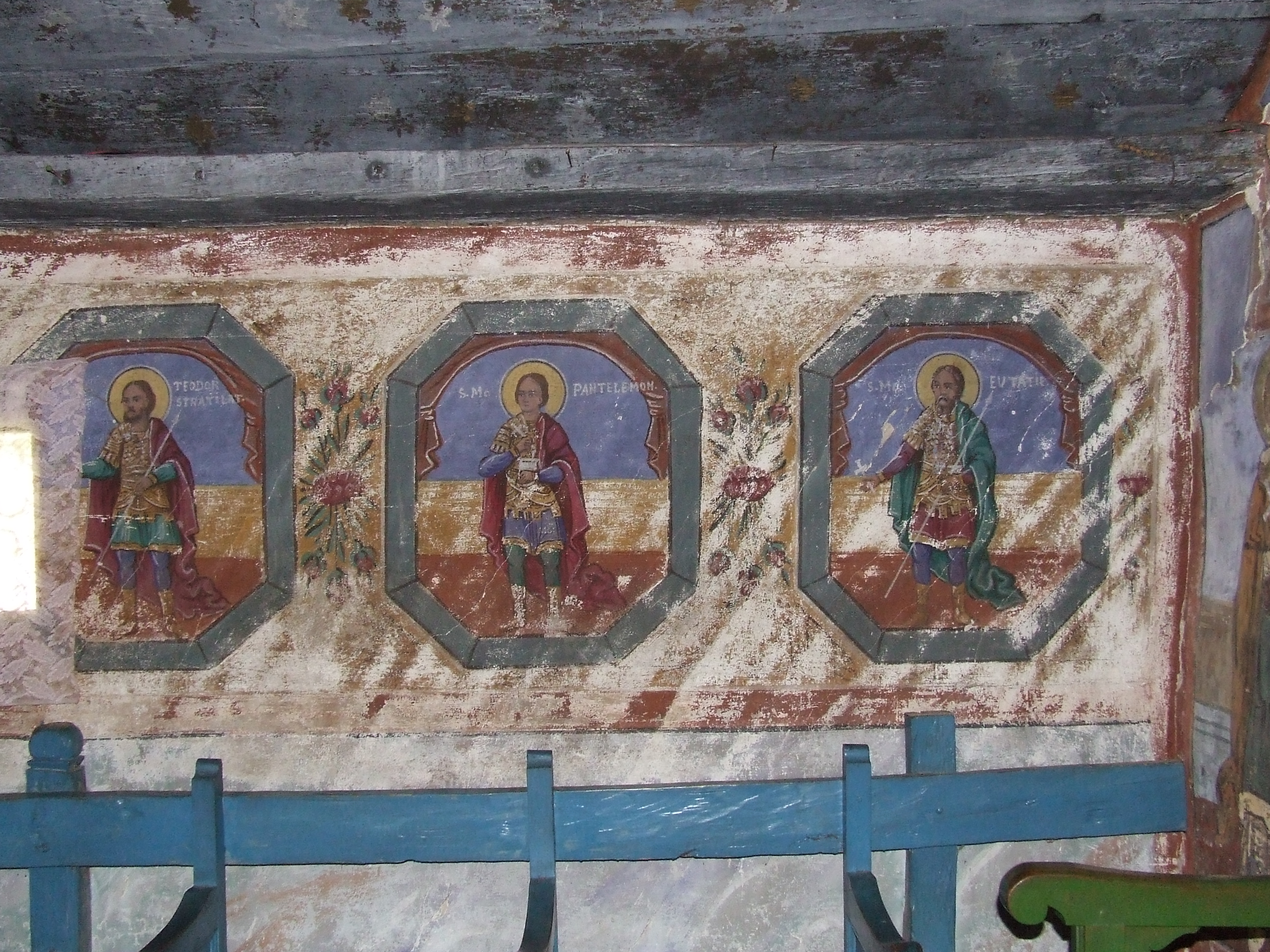 Biserica de lemn din Opătești, județul Vâlcea